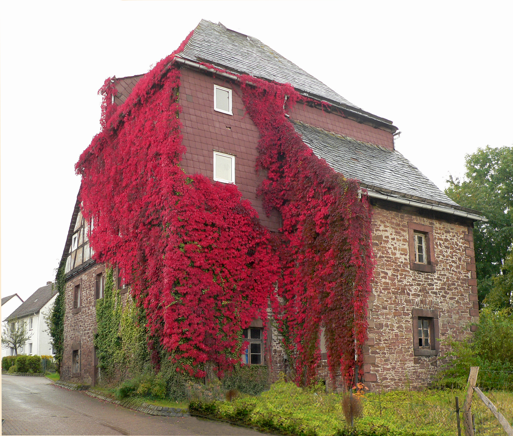 Die Alte Mühle oder Windmühle, früheres Gebäude der Porzellanmanufaktur Fürstenberg